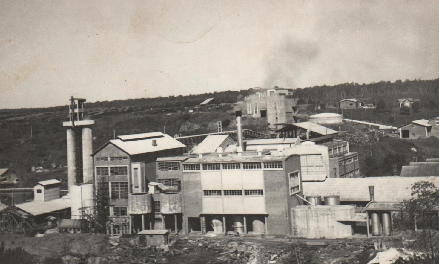 Planta de Celulosa Argentina SA, en la localidad de Puerto Piray, Misiones. Foto tomada del archivo de la familia Unternahrer. Año 1960.